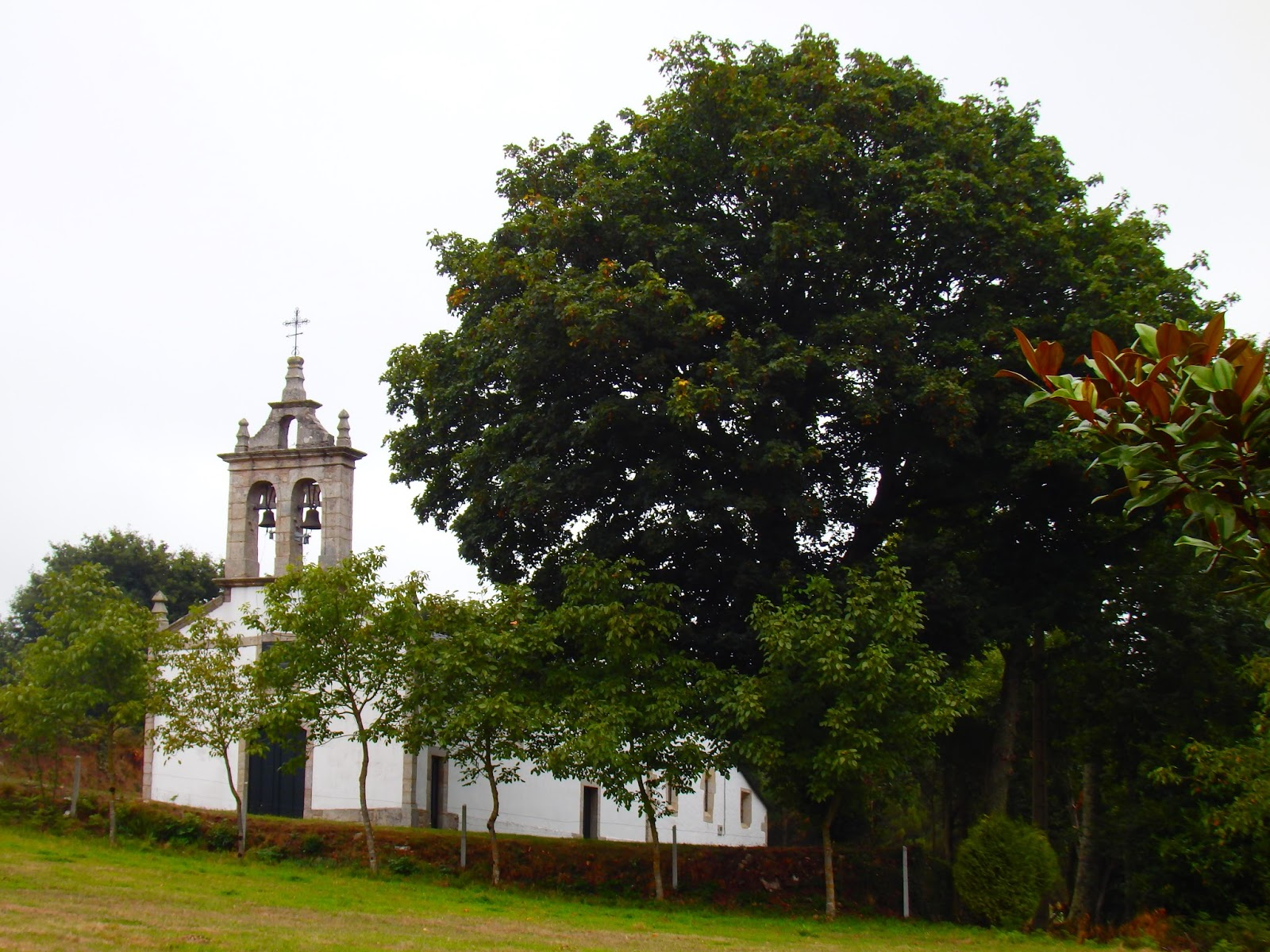 Ver título.